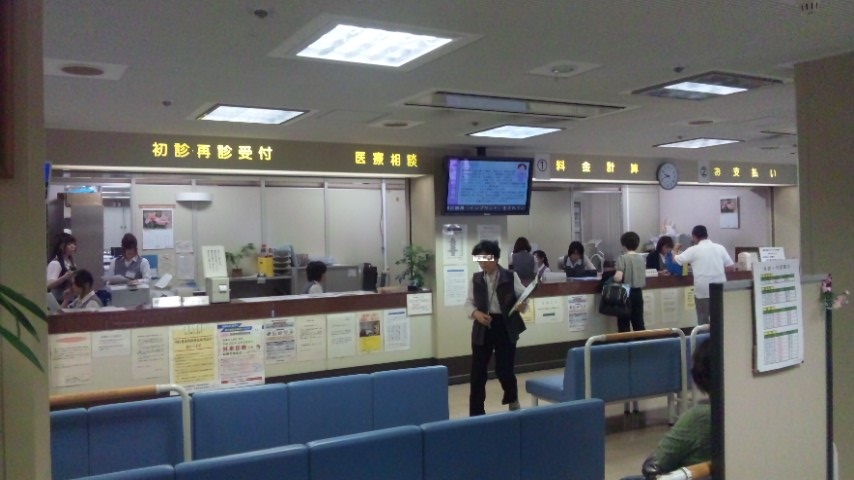 受け付け会計